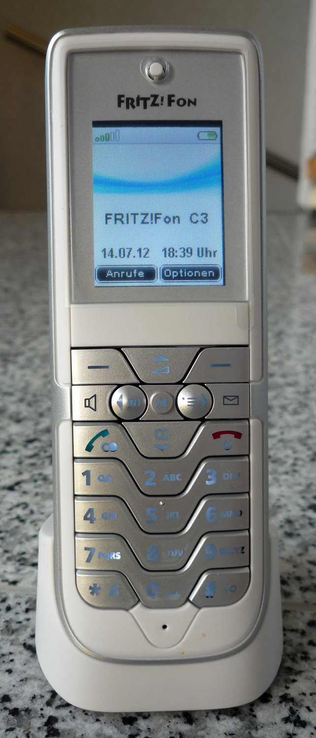 FRITZ!Fon C3 (mit dem Standard-Hintergrundbild als Startbildschirm)